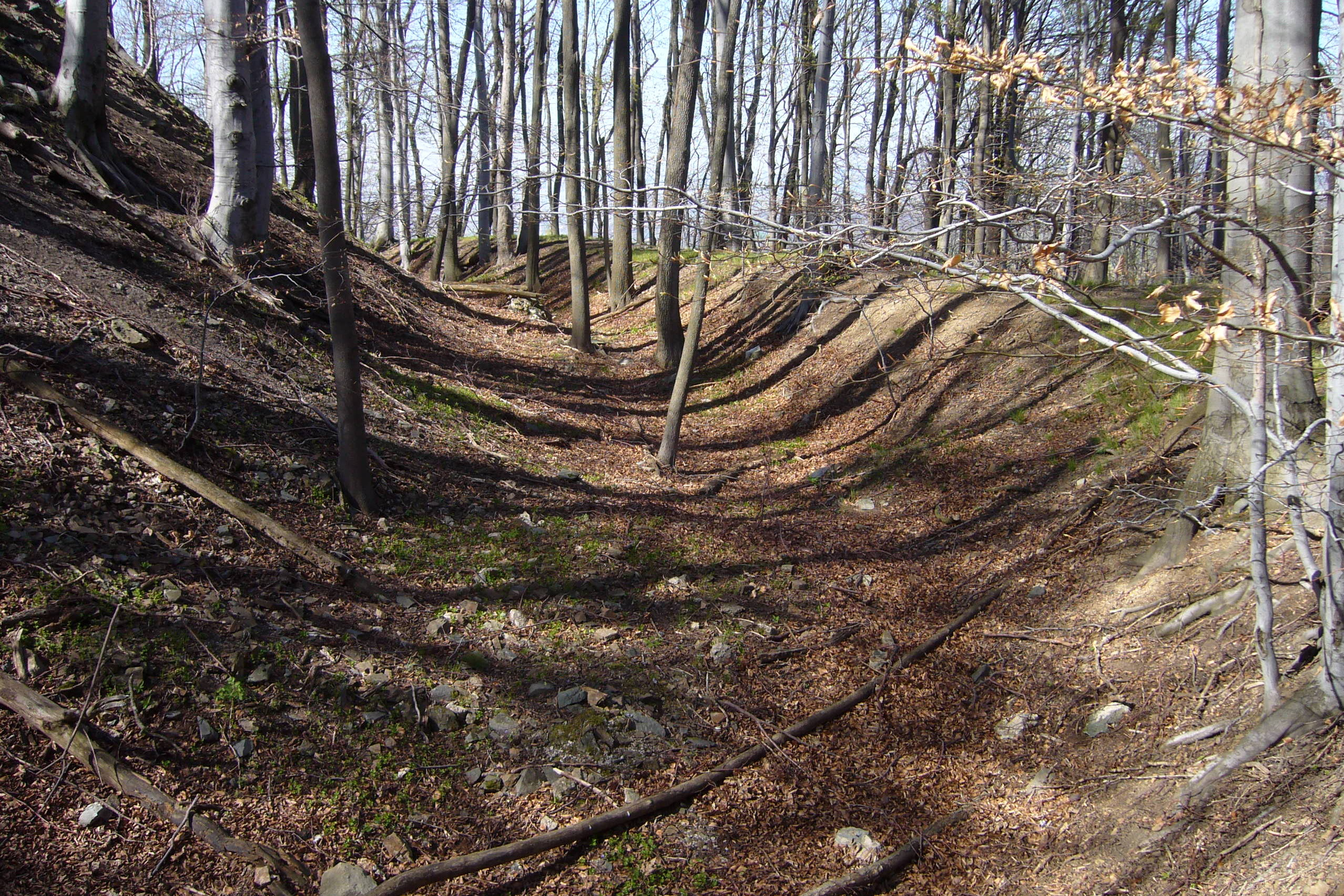 Raimund – severovýchodní část příkopu